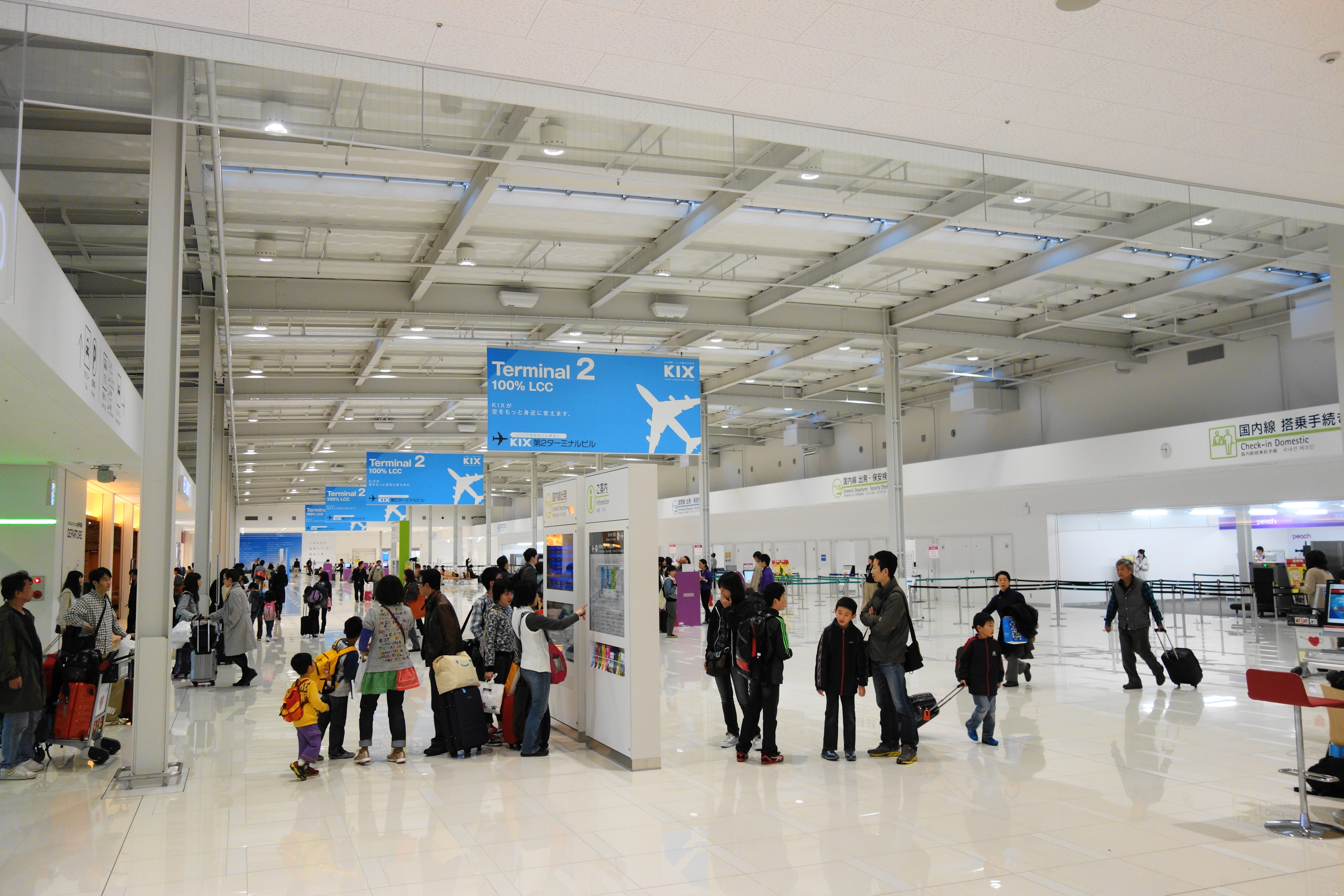 関西空港 第2ターミナルビル